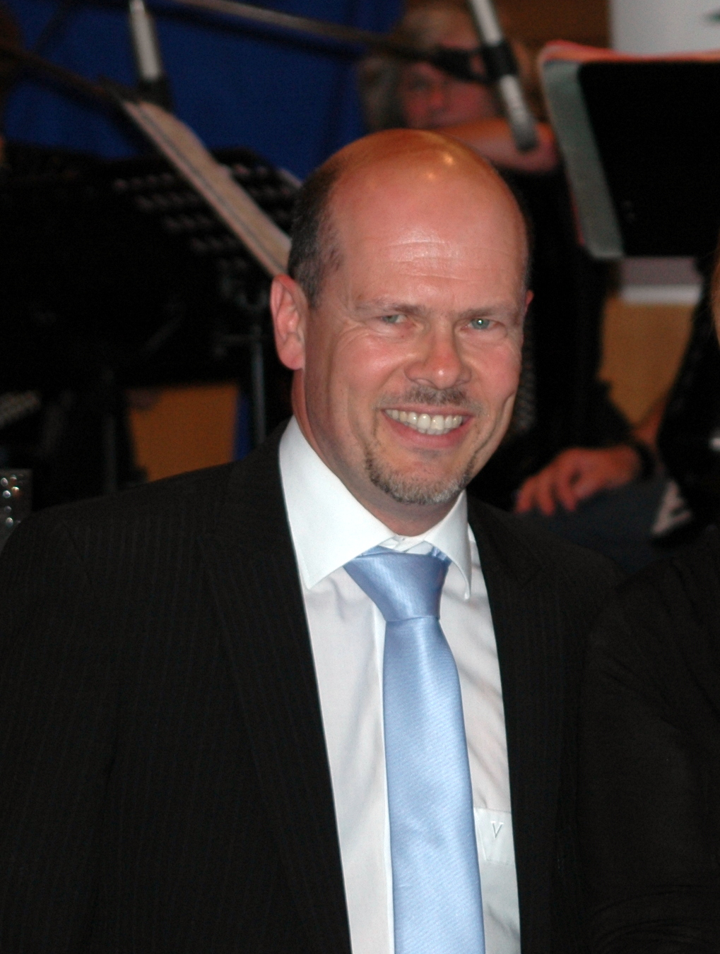 48. Jahre Partnerschaft Vertus - Bammental: Bürgermeister Holger Karl